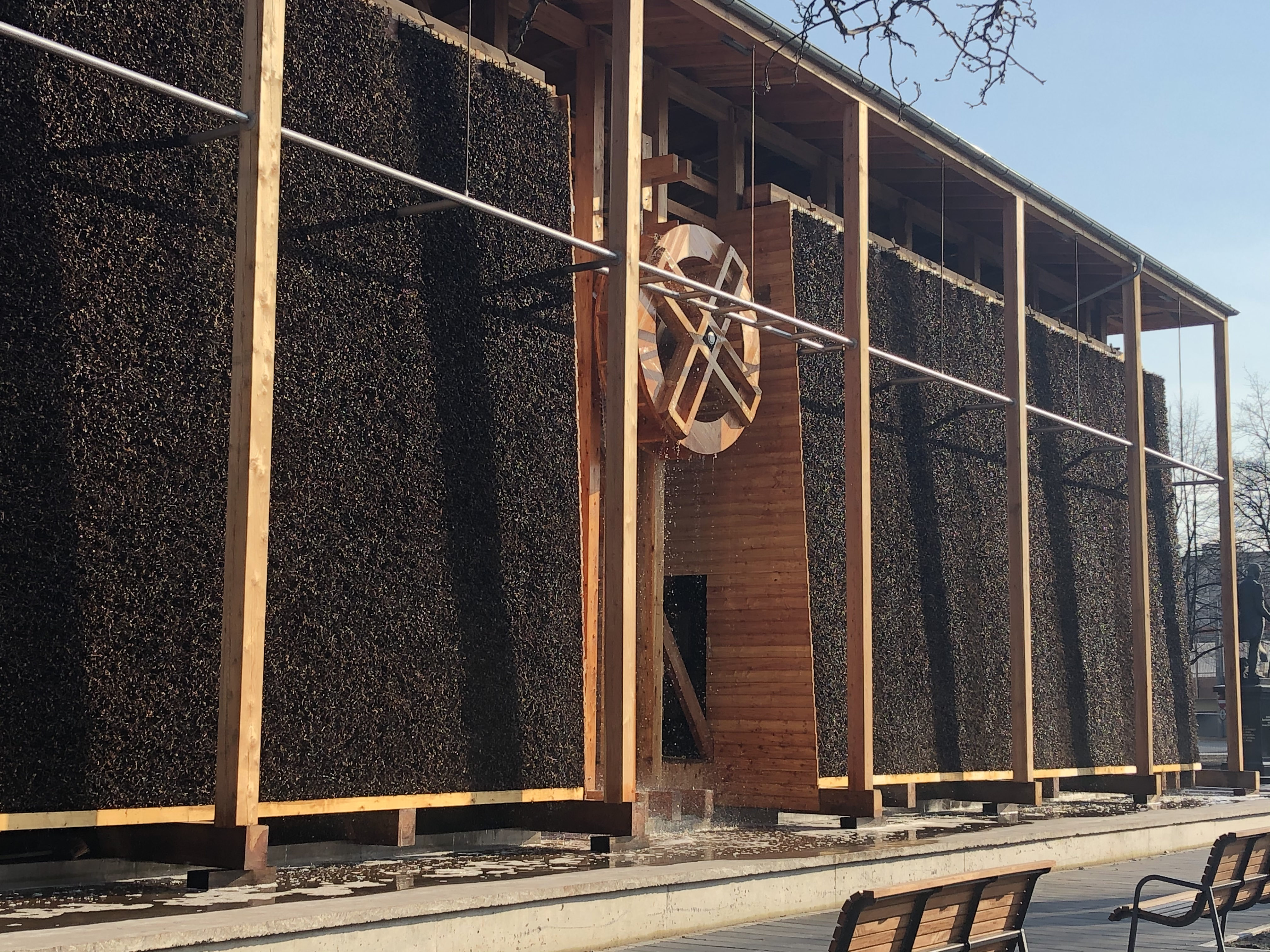 Tężnia w Chorzówie